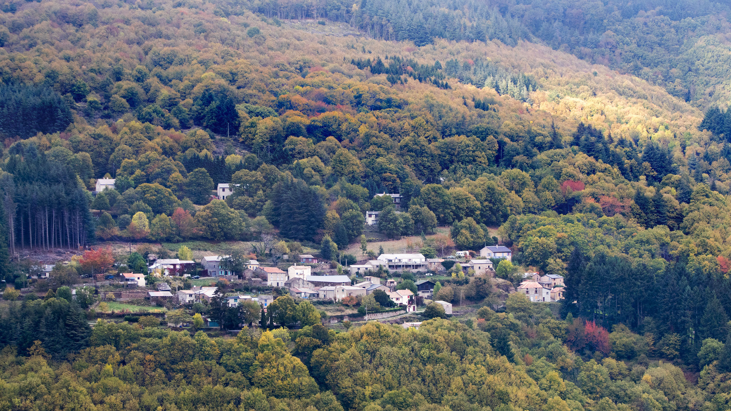 Bourdials